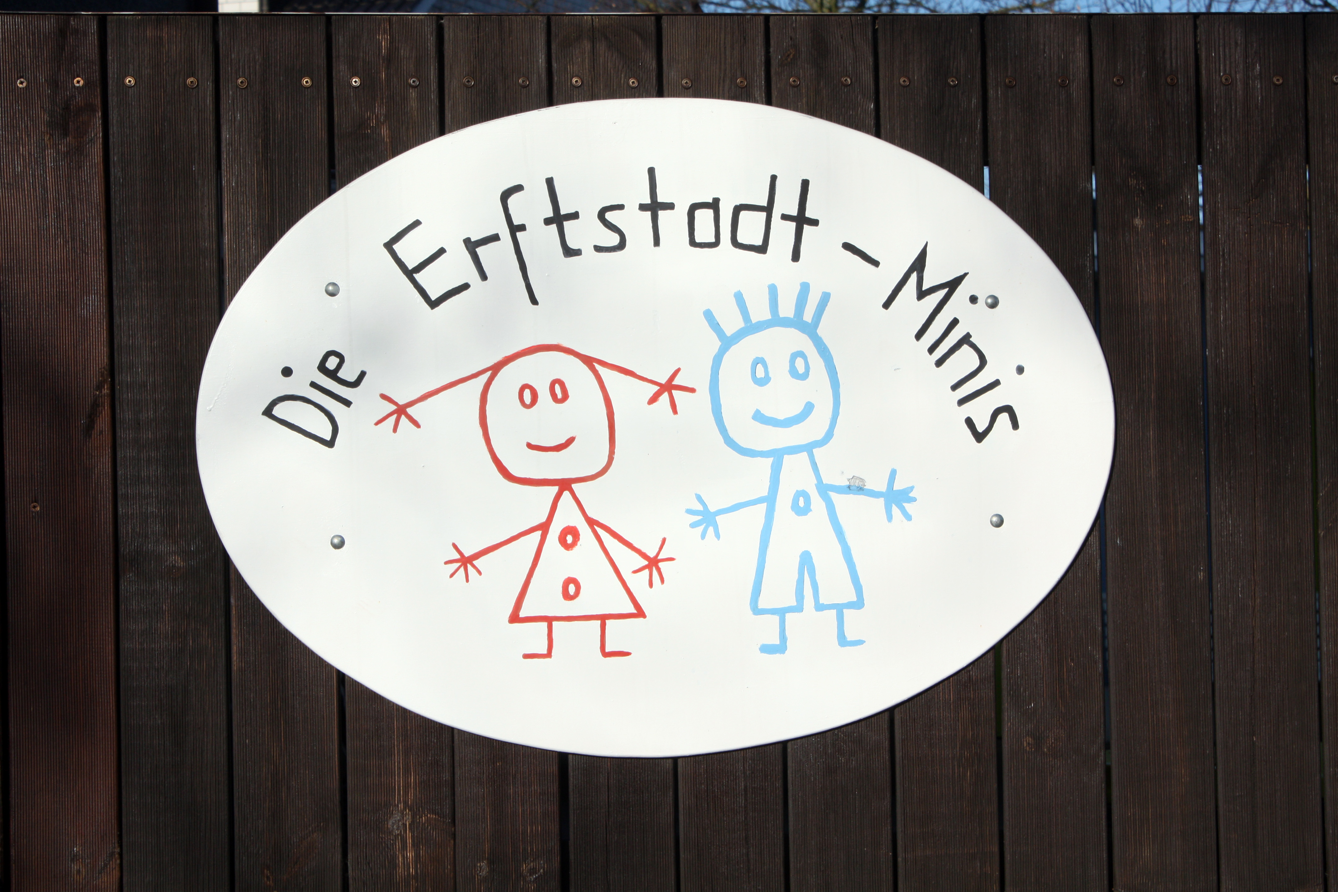 Lechenich, Stadtdetail